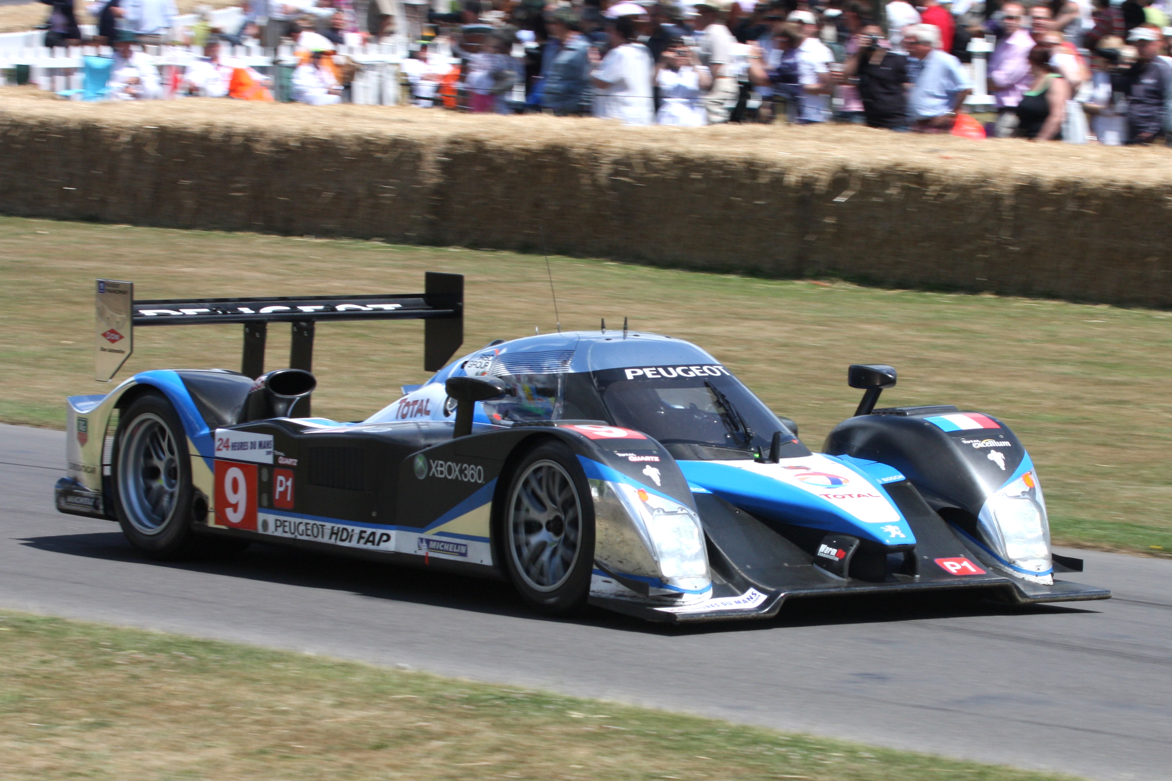 2009 Peugeot 908 HDI FAP driven by Alexander Wurz